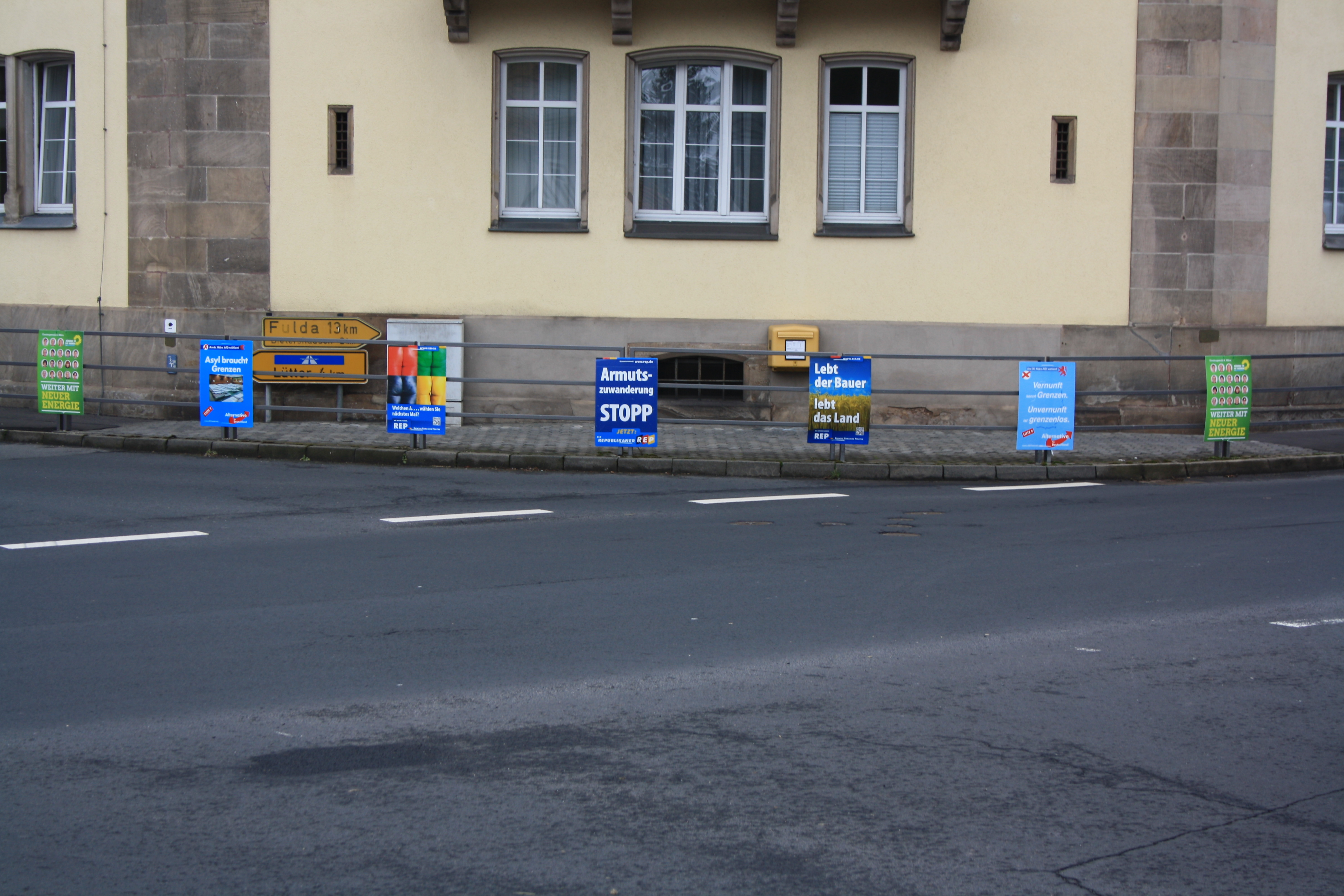 Wahlplakate zur Kommunalwahl in Hessen in Ebersburg